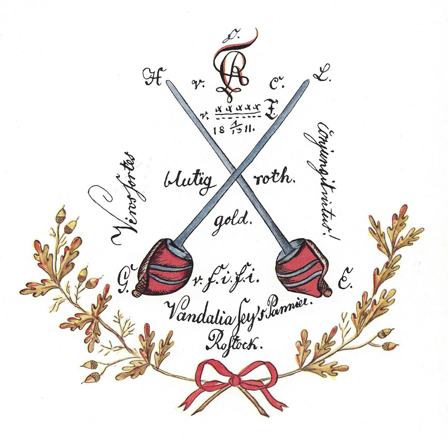 Bundeszeichen des erloschenen Corps Rostochia (1812-1818)